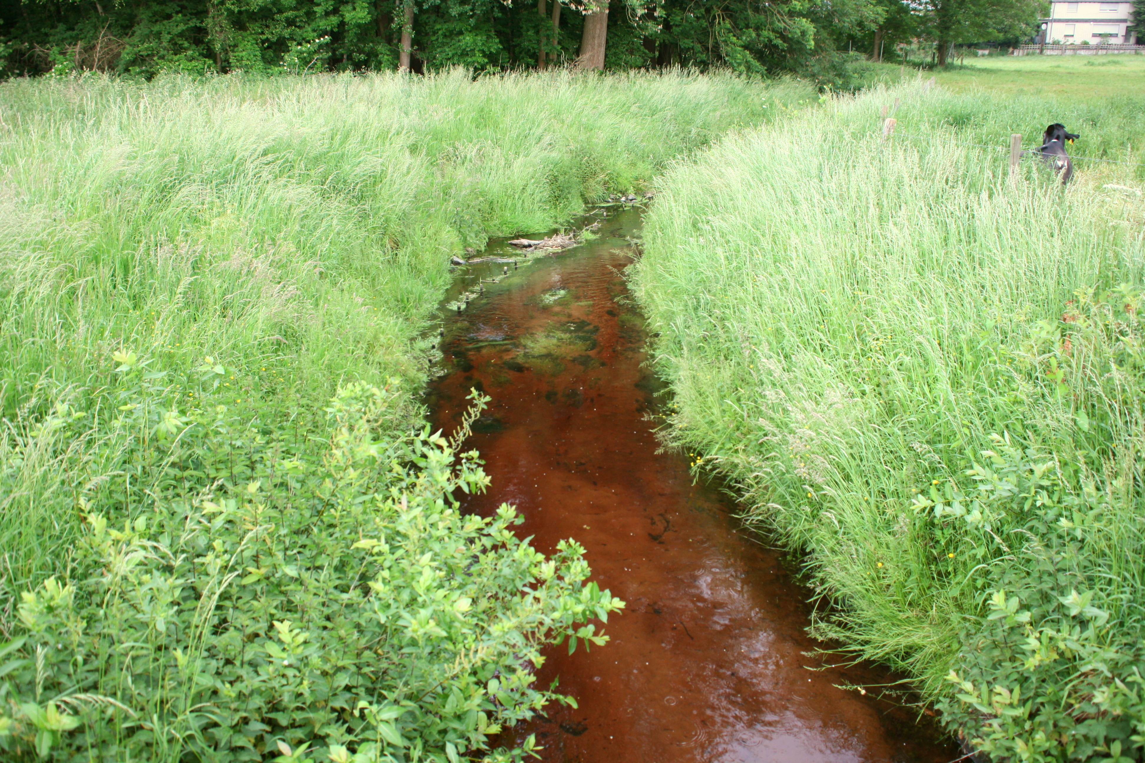 Nette, An der Weuthenmühle in Boisheim , Viersen